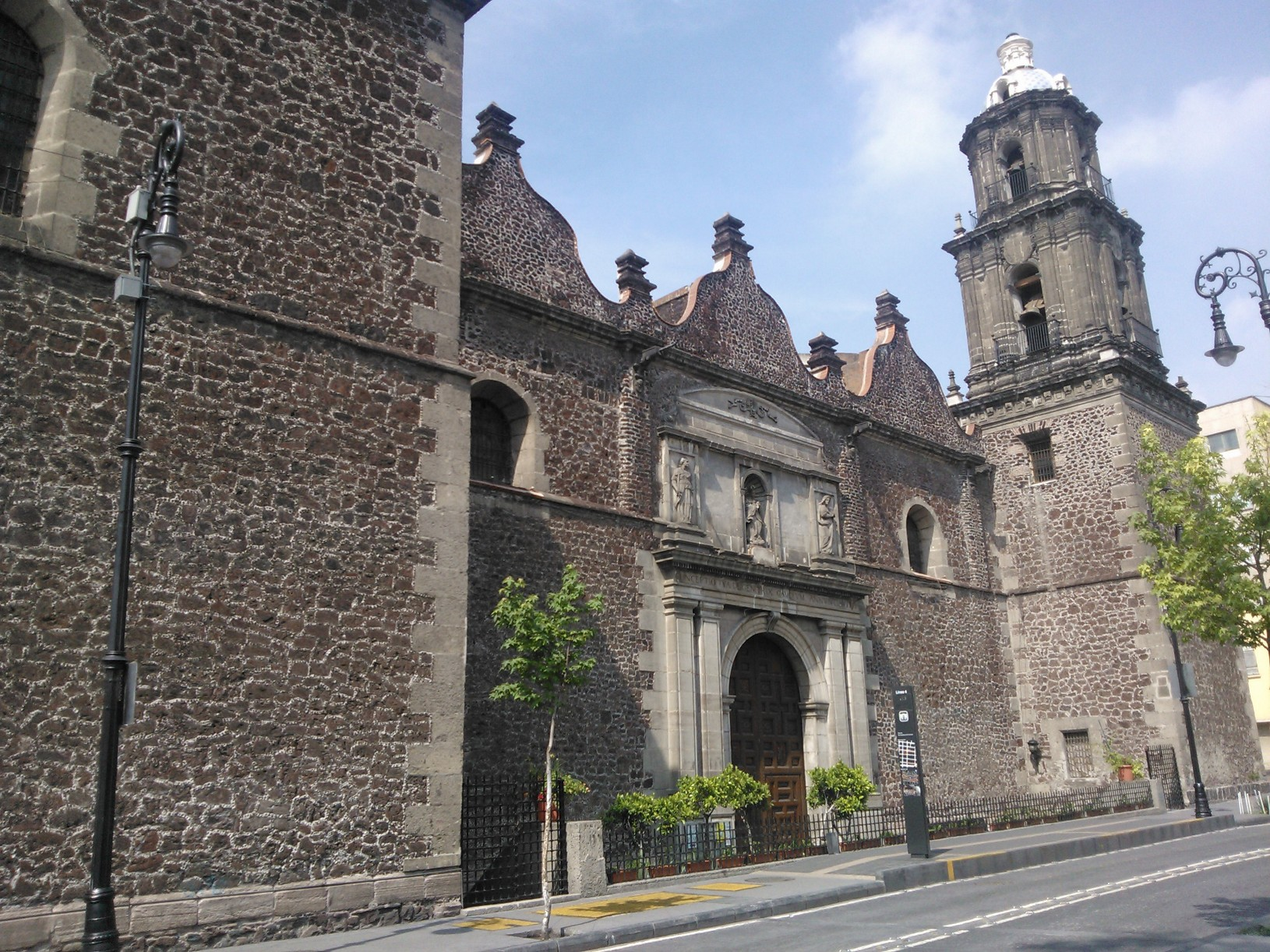 Fachada del Templo de Jesus Nazareno en el centro historico de la ciudad de Mexico